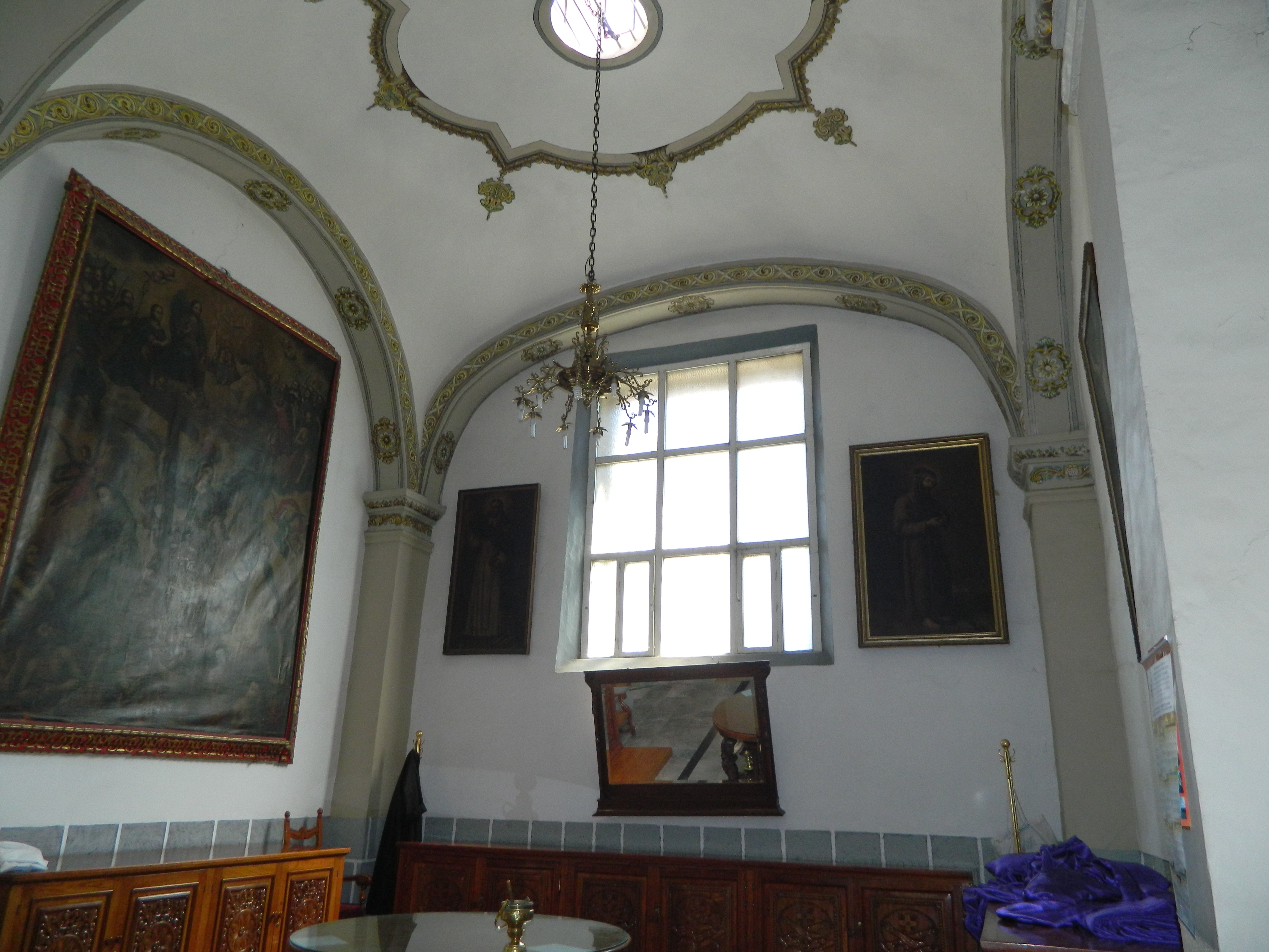 Sacristia De La Parroquia de San Juan Bautista Coyoacán.